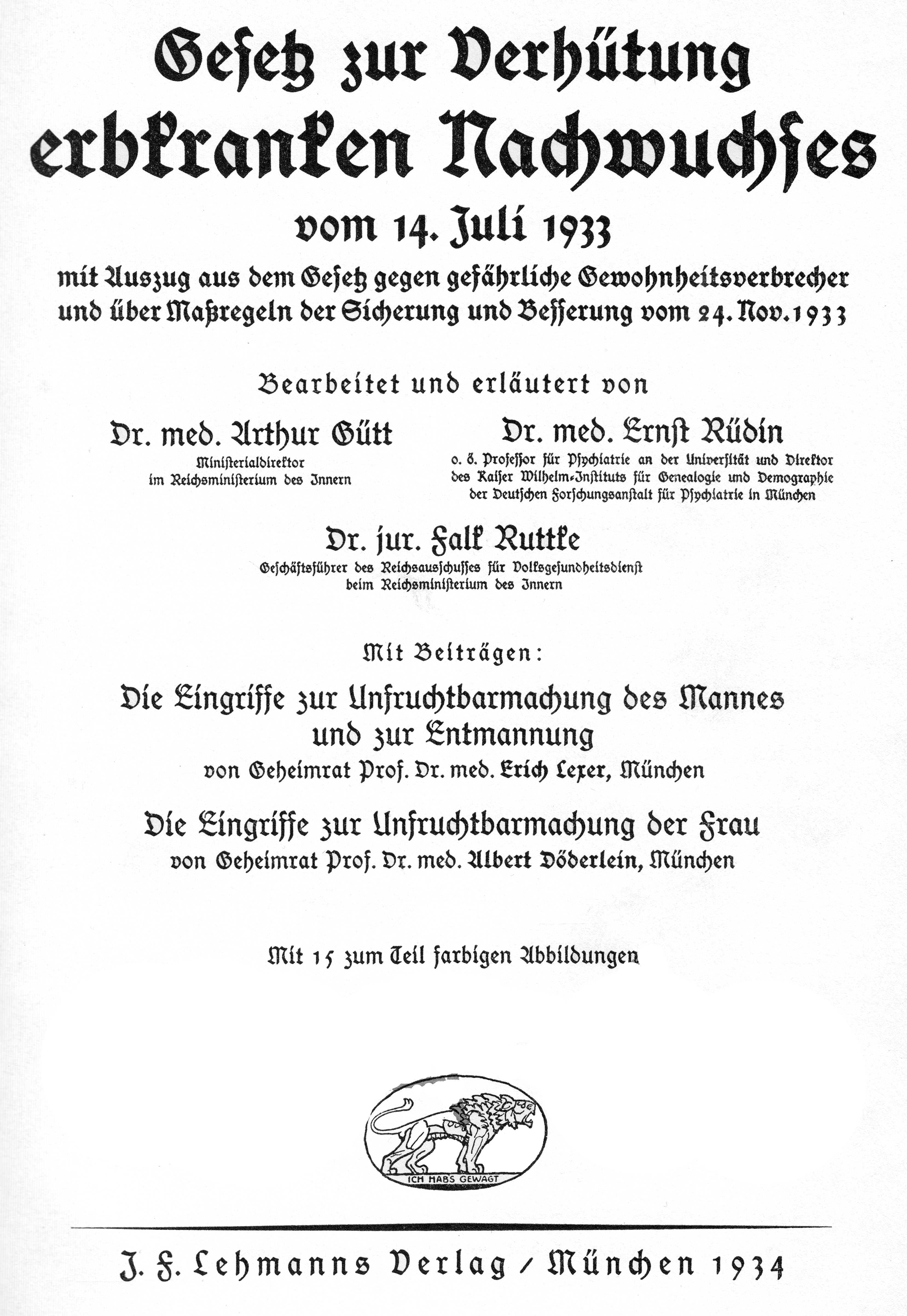 Gesetz zur Verhütung erbkranken Nachwuchses. Kommentarband. Titelblatt